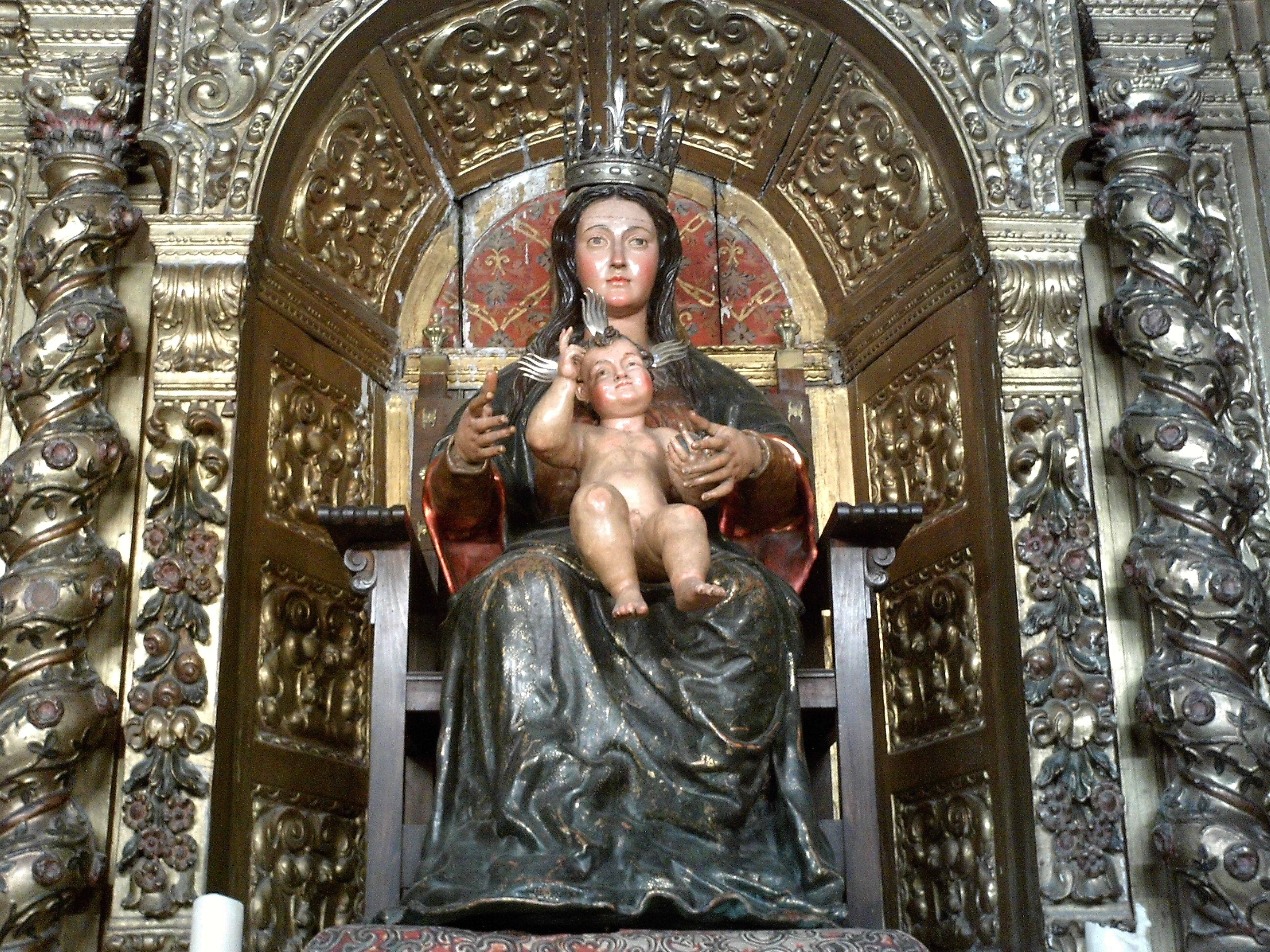 Virgen de la Victoria, que proviene del antiguo convento de Nuestra Señora de la Victoria, de la Orden de los Mínimos de San Francisco de Paula. Frente a esta imagen tuvo lugar el 2 de agosto de 1519 el rito de la entrega de banderas para las cinco naves de la expedición de Magallanes-Elcano y el juramento de los 234 expedicionarios. El 9 de septiembre de 1522 Juan Sebastián Elcano y los otros 17 supervivientes que habían regresado en la nao Victoria rezaron primero frente a esta imagen y luego ante la Virgen de la Antigua. Iglesia de Santa Ana. Sevilla, Andalucía, España.